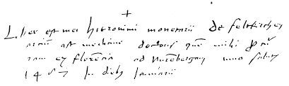 Besitzvermerk des Hieronymus Münzer in seiner Platonausgabe